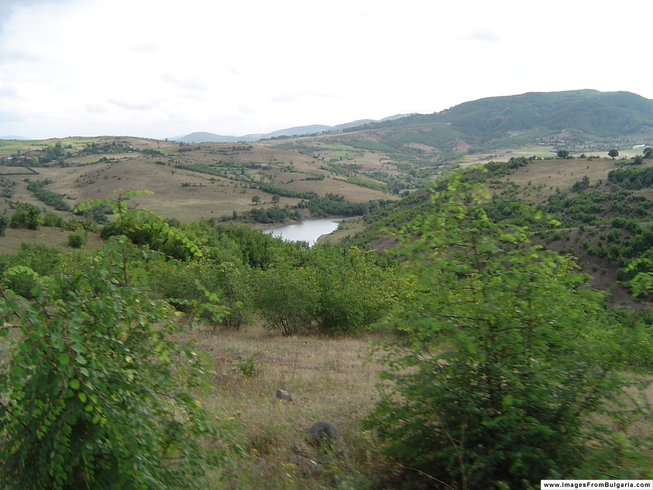 Reservoire "Karamfil", Krumovgrad municipality, Bulgaria